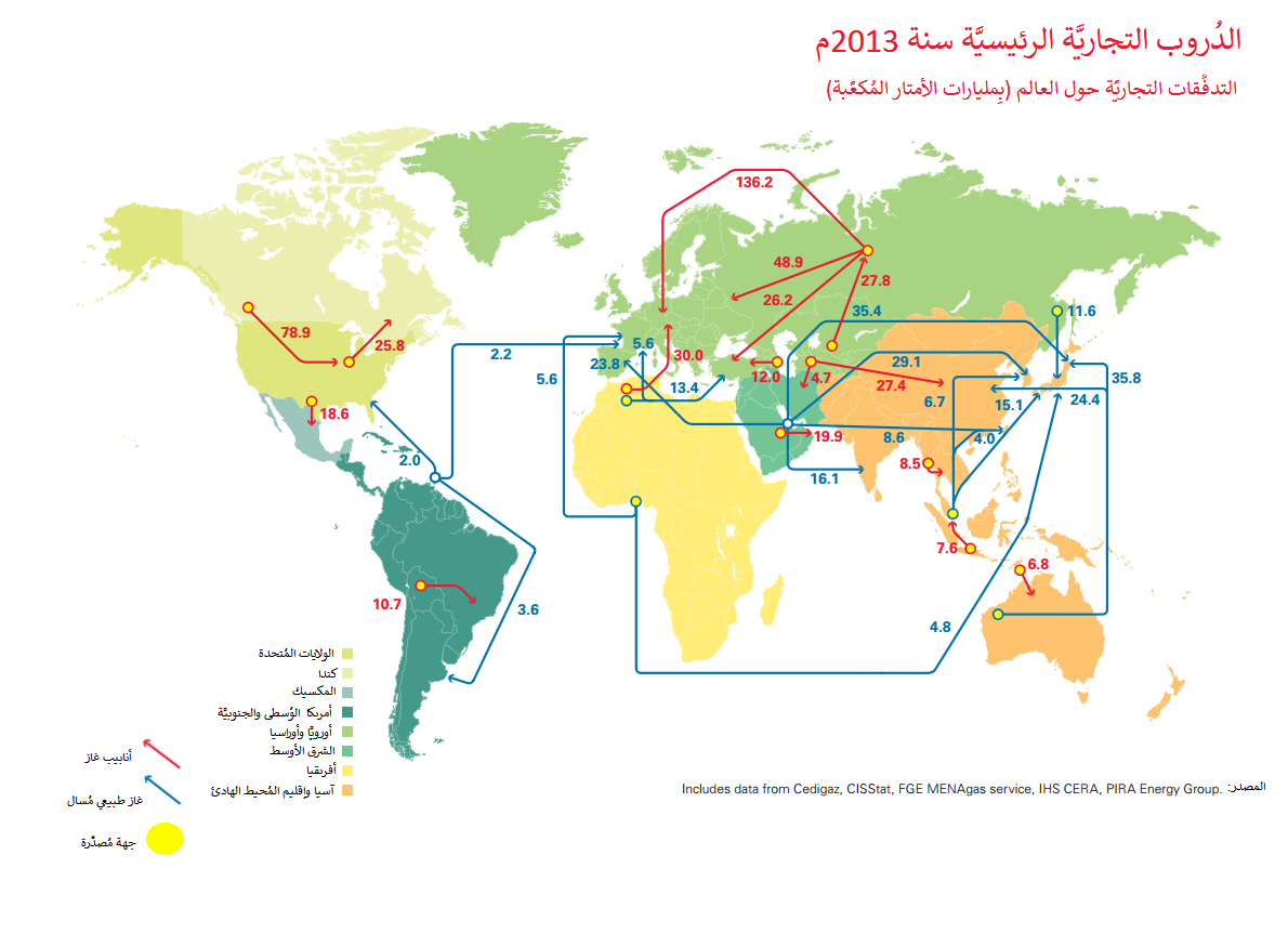 خارطة تُظهر الدُروب التجاريَّة الرئيسيَّة في قطاع الغاز، سنة 2013م.